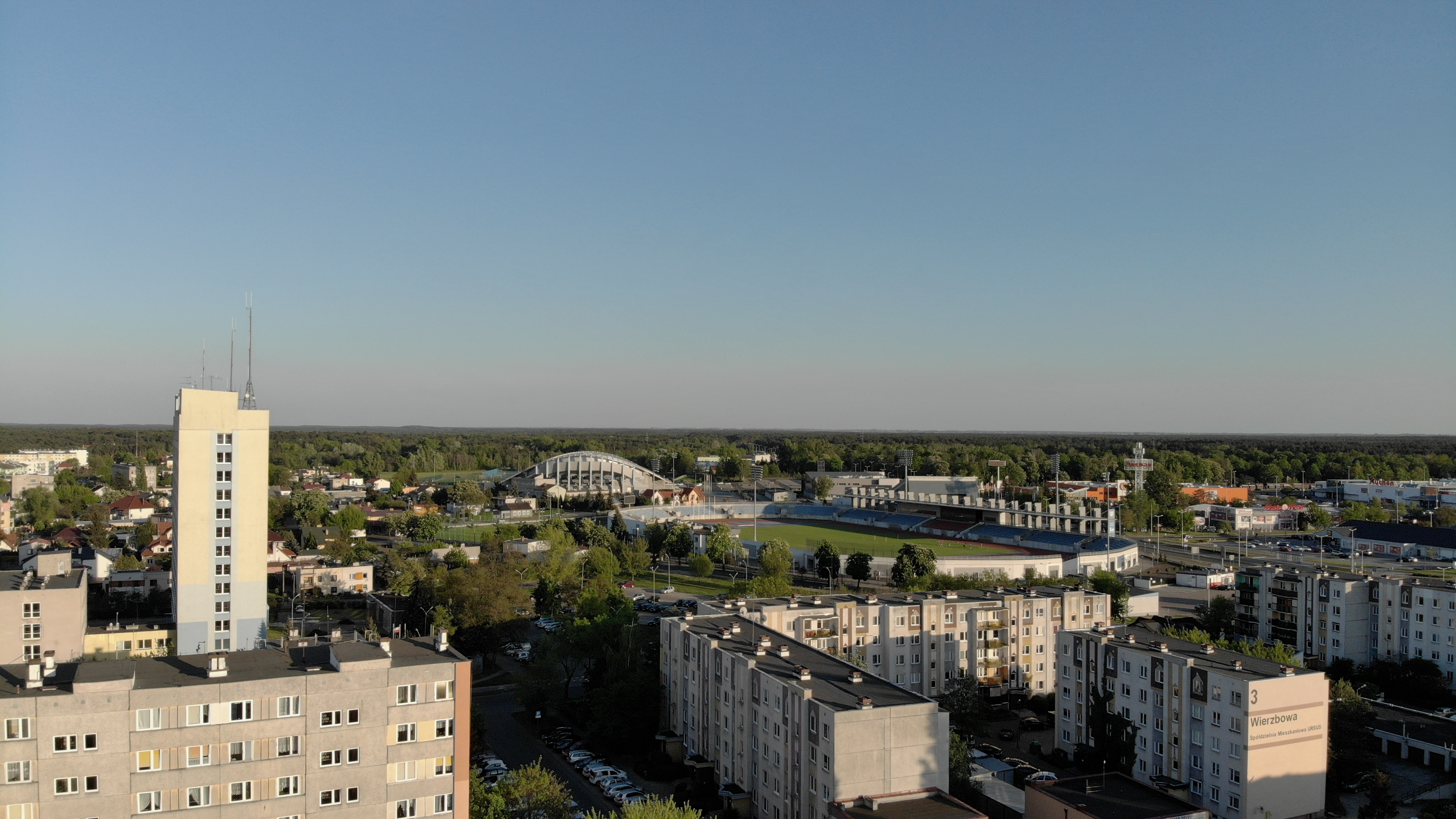 Styk Śródmieścia i Kazimierza Wielkiego (2020 r.)